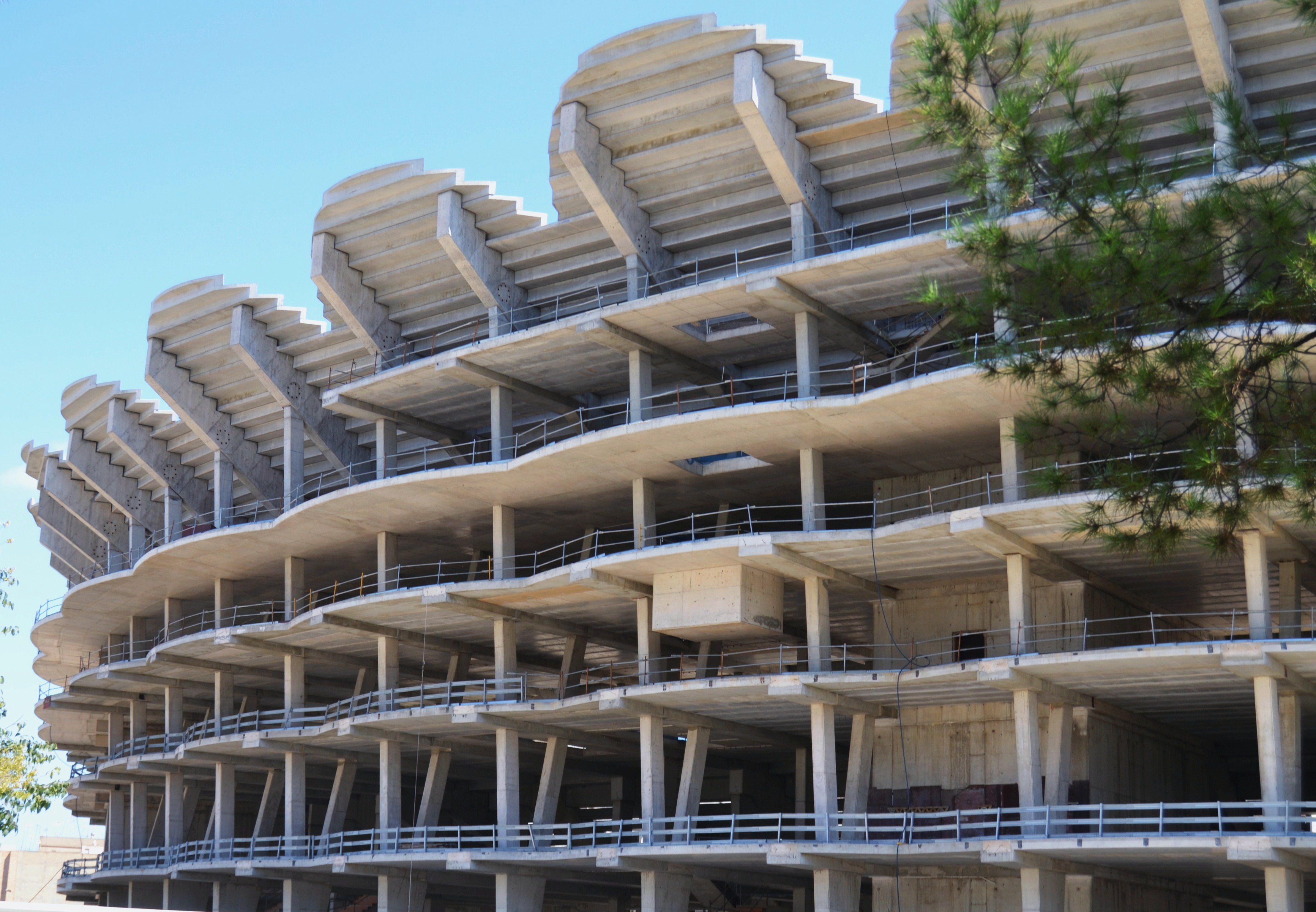 València, Nou Mestalla.